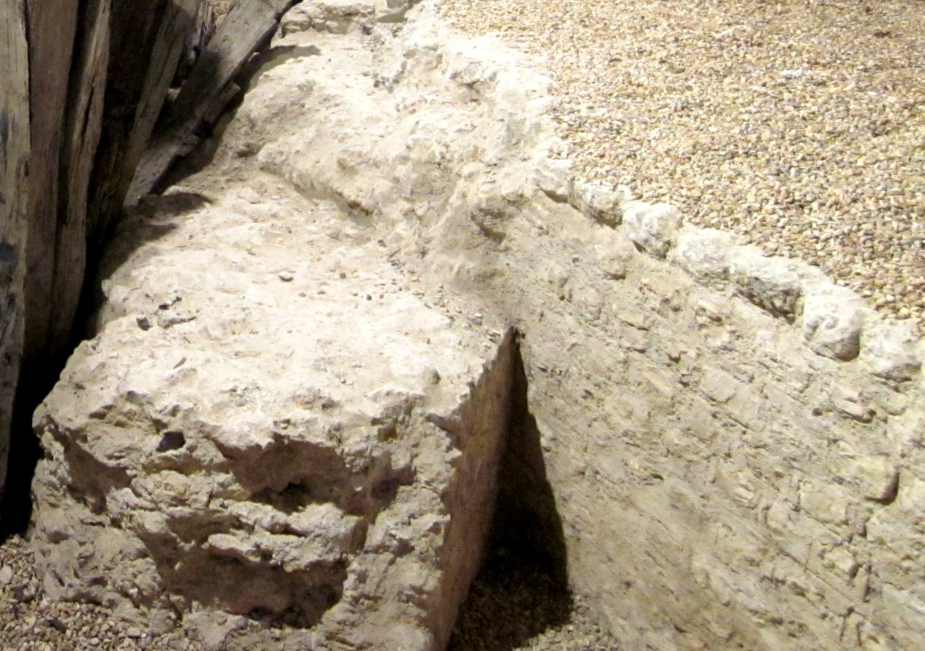 Pronaos tu temple de Tours